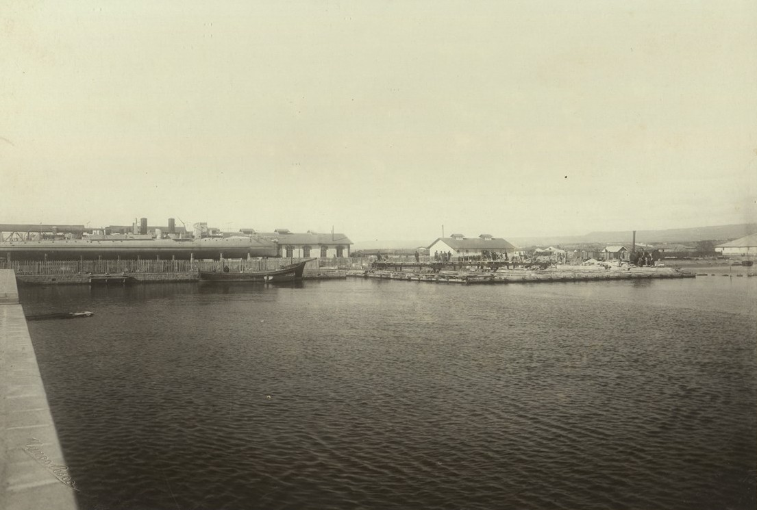 Строежът на хелинга на военната флота в Пристанище Варна, общ план.